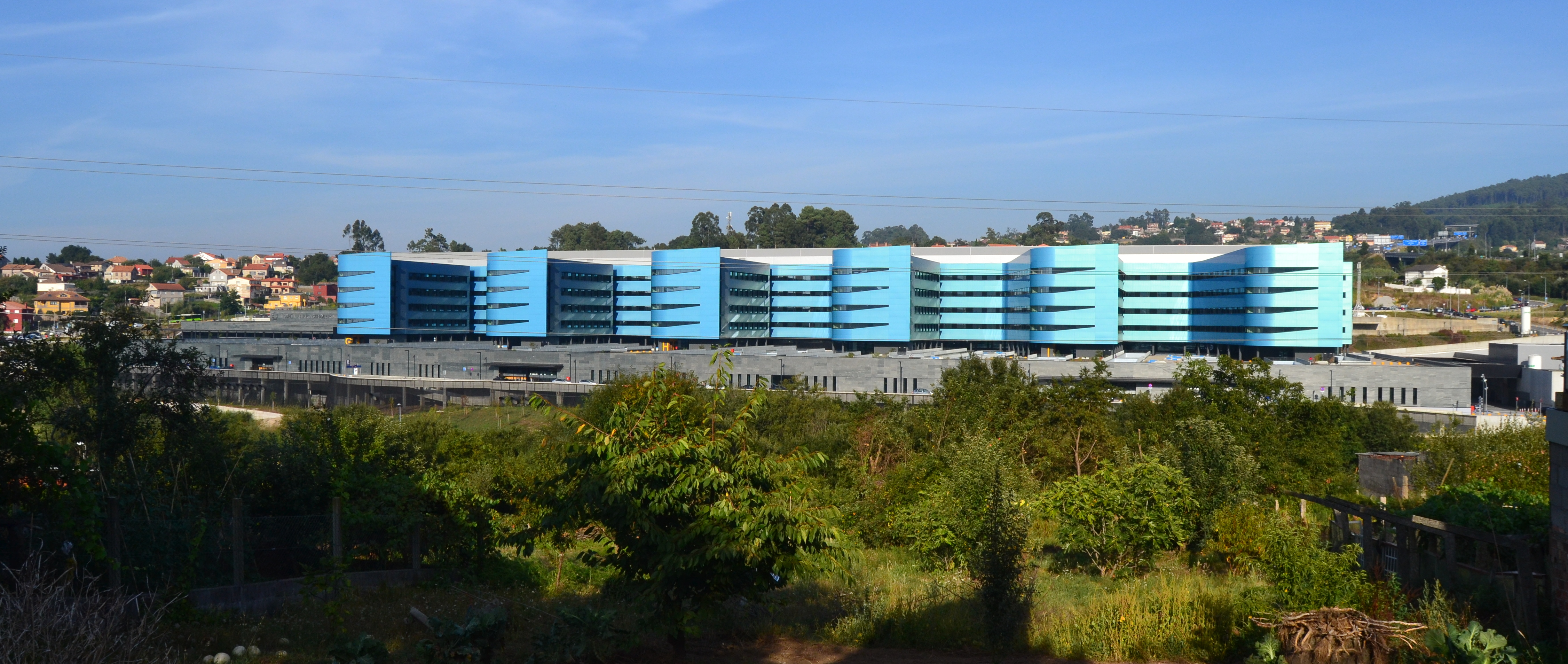 Hospital Álvaro Cunqueiro